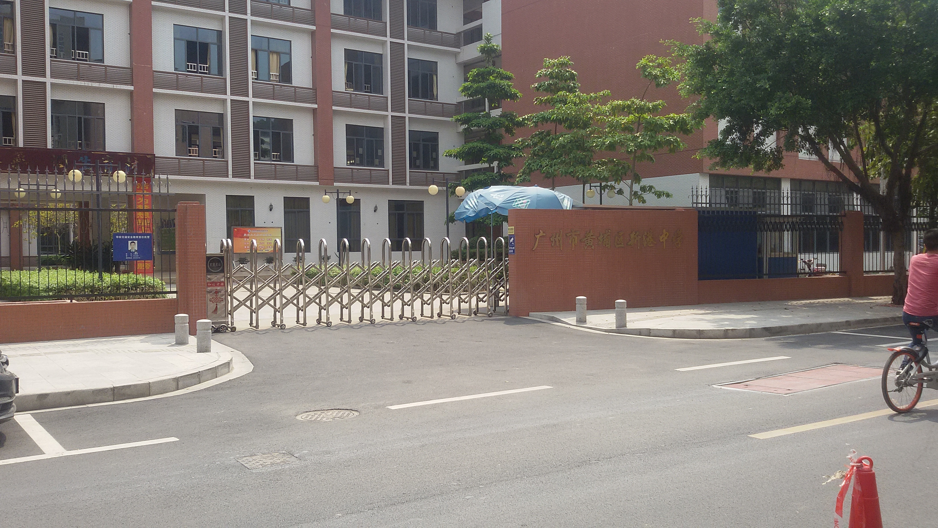 粵語: 黃埔區新港中學嘅學校大門